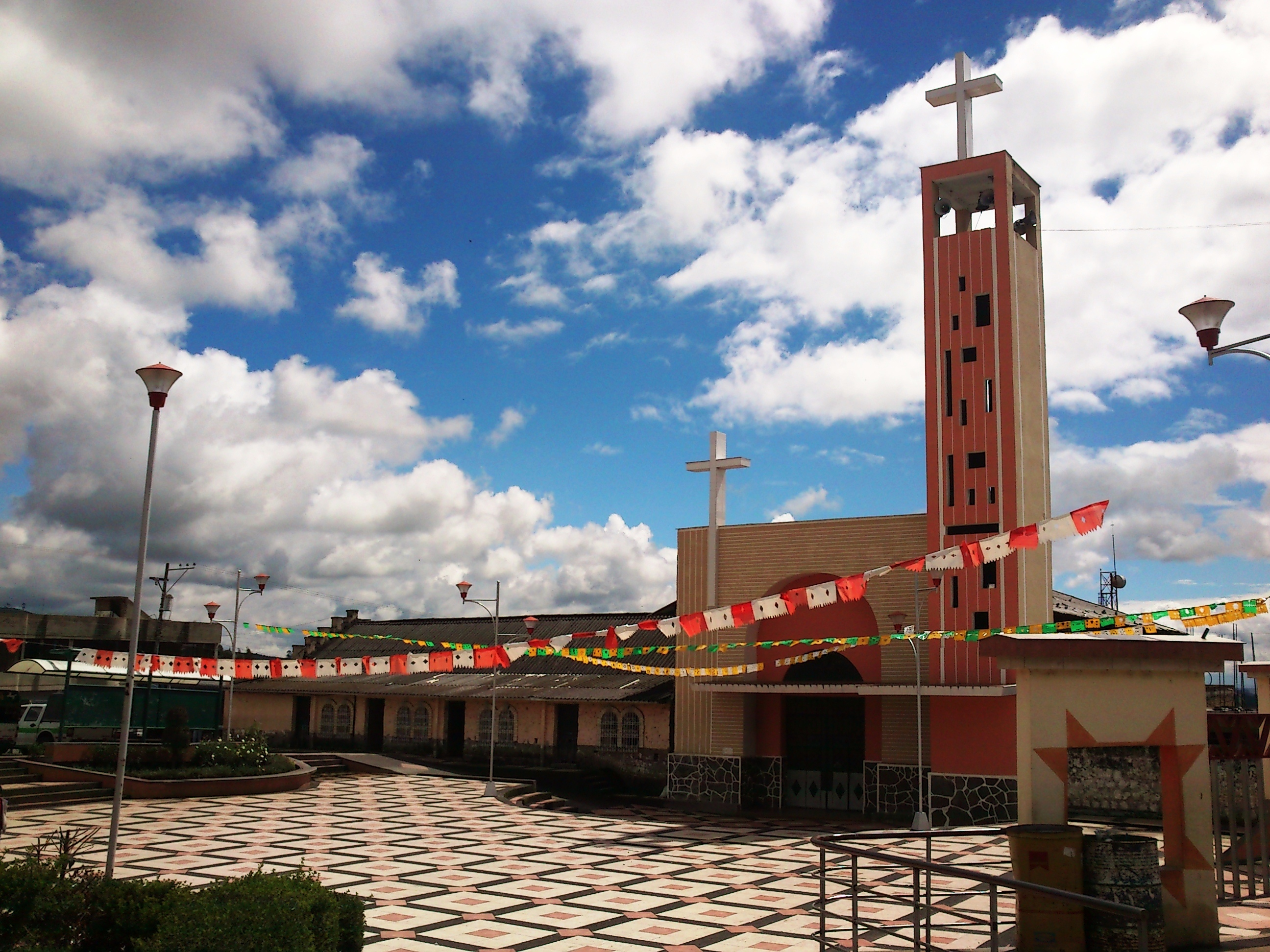 Vista de la parroquia Tufiño, perteneciente al cantón Tulcán